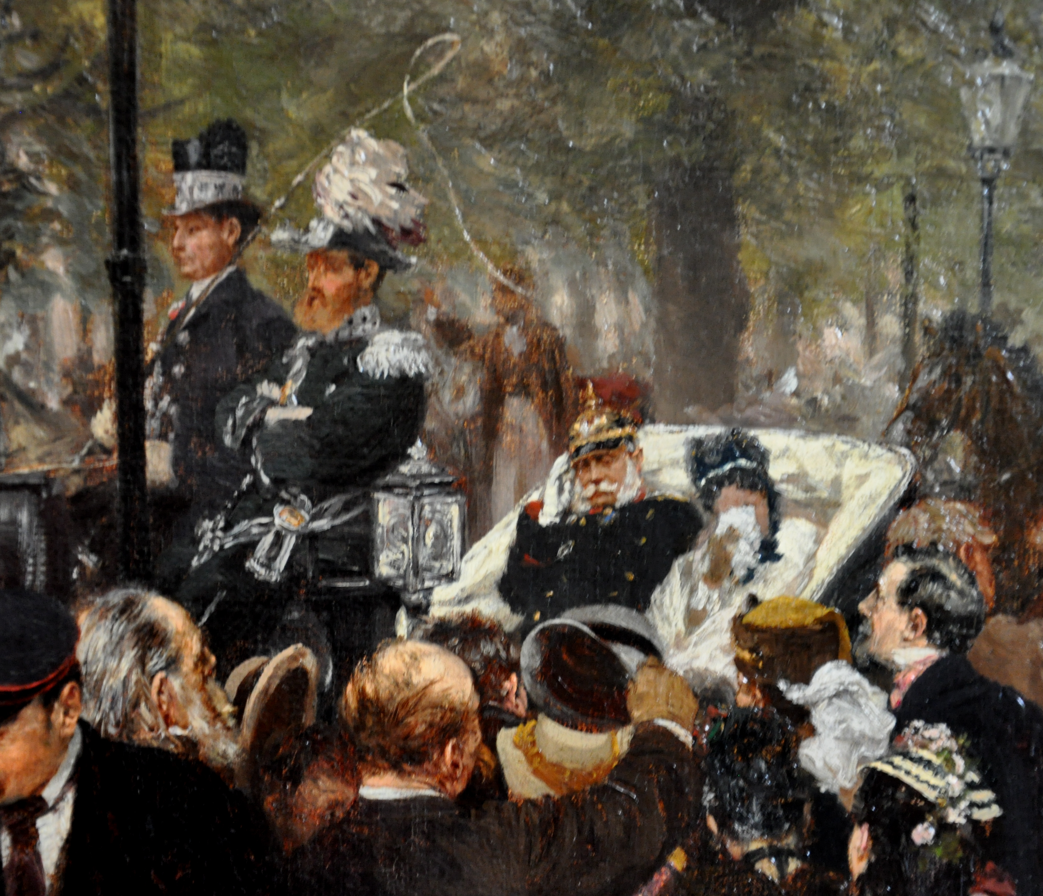 Detail: König Wilhelm